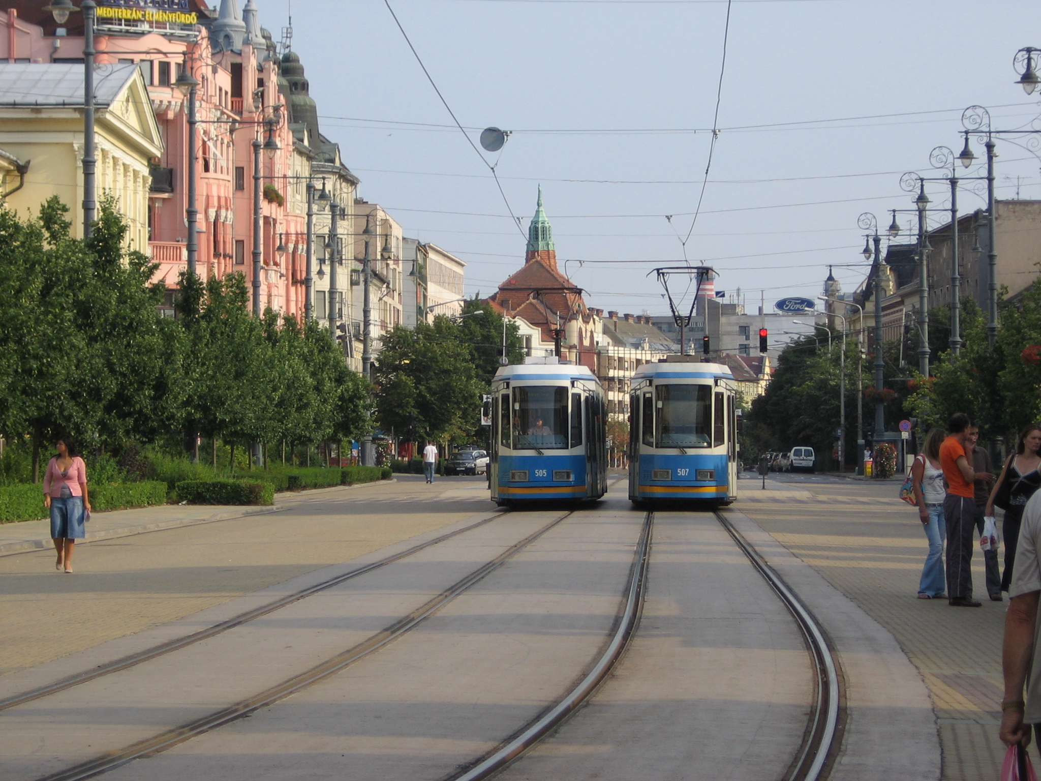 Two trams passing by each other at Piac ut in Debrecen Mijające się tramwaje na Piac ut w Debreczynie